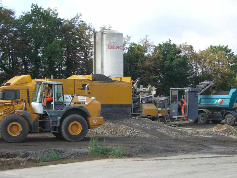 Mobile Mischanlage - auch Zentralmischverfahren genannt